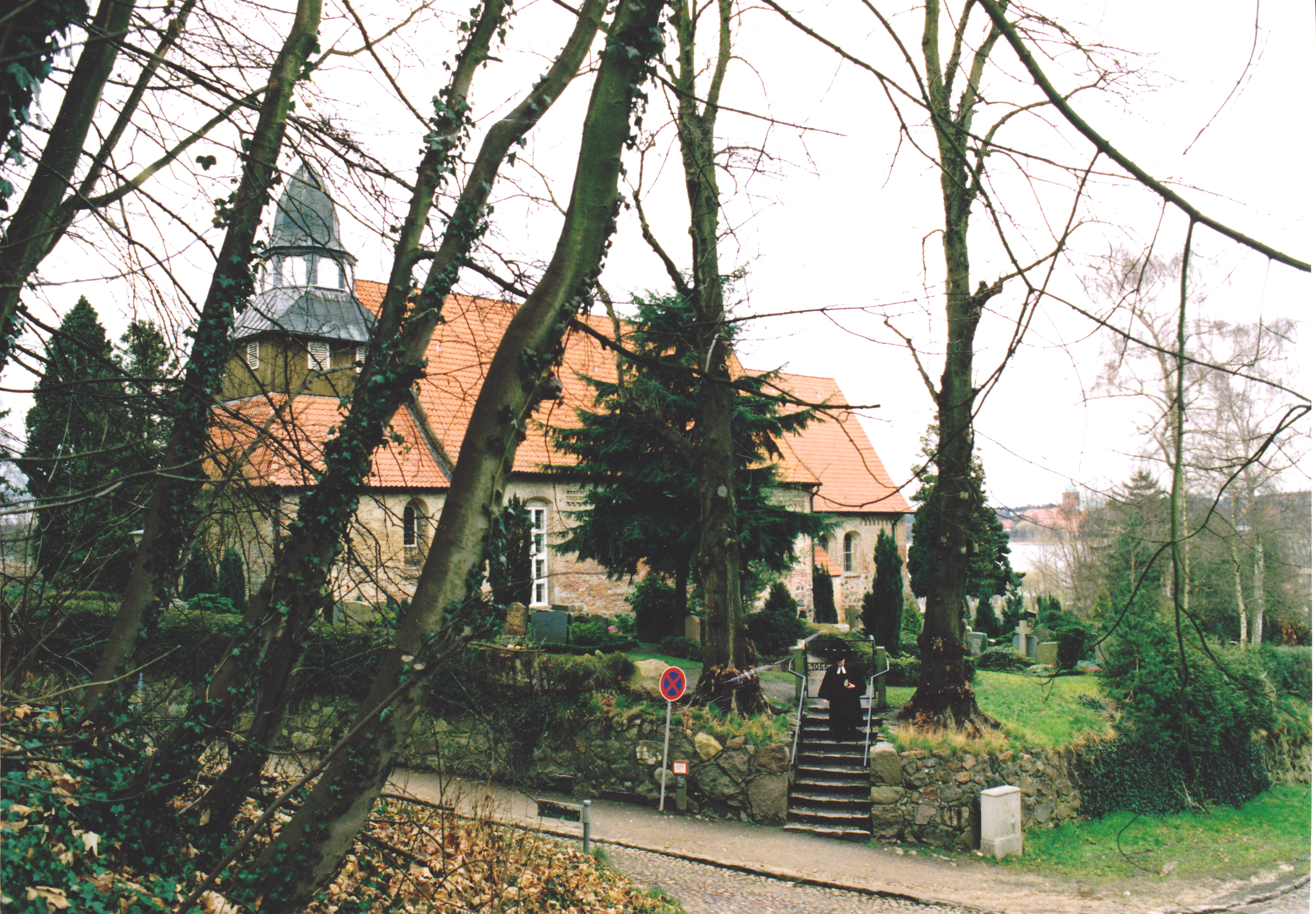 Das Bild zeigt St.Georg auf dem Berge in Ratzeburg; im Hintergrund der Ratzeburger Dom